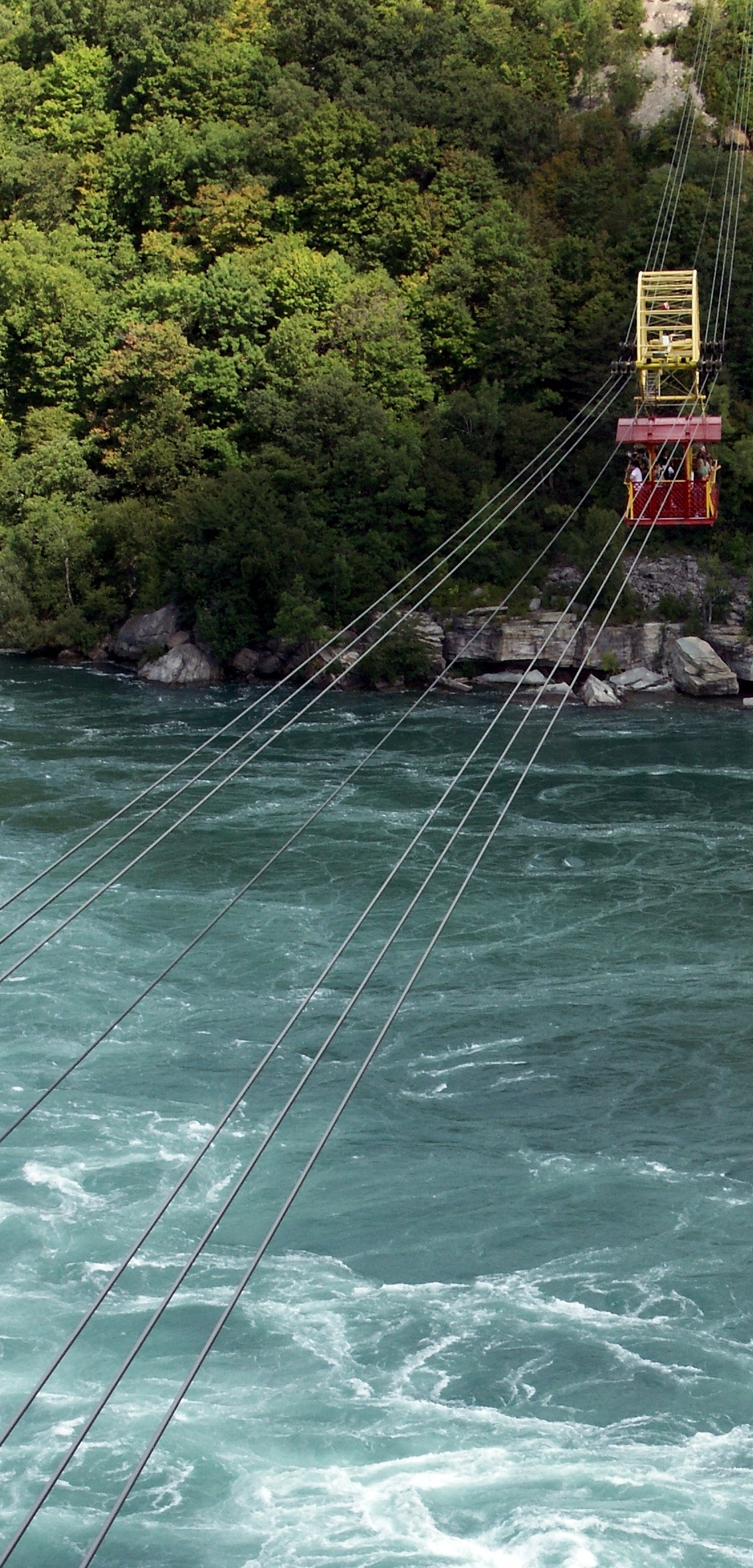 Niagara Whirlpool Aero Car von 1916, erbaut von Leonardo Torres Quevedo über den Whirlpool Rapids